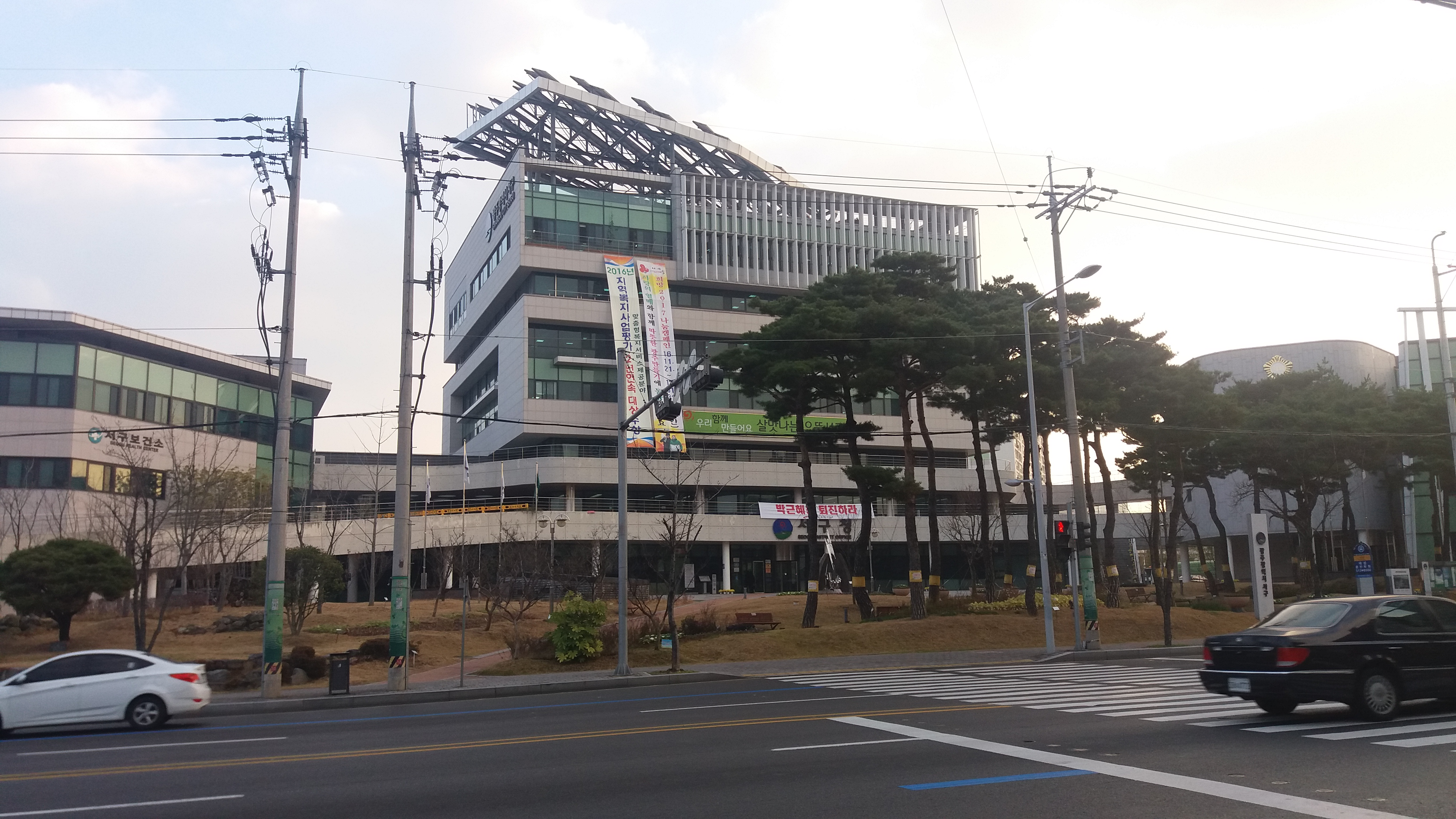 광주광역시 서구청